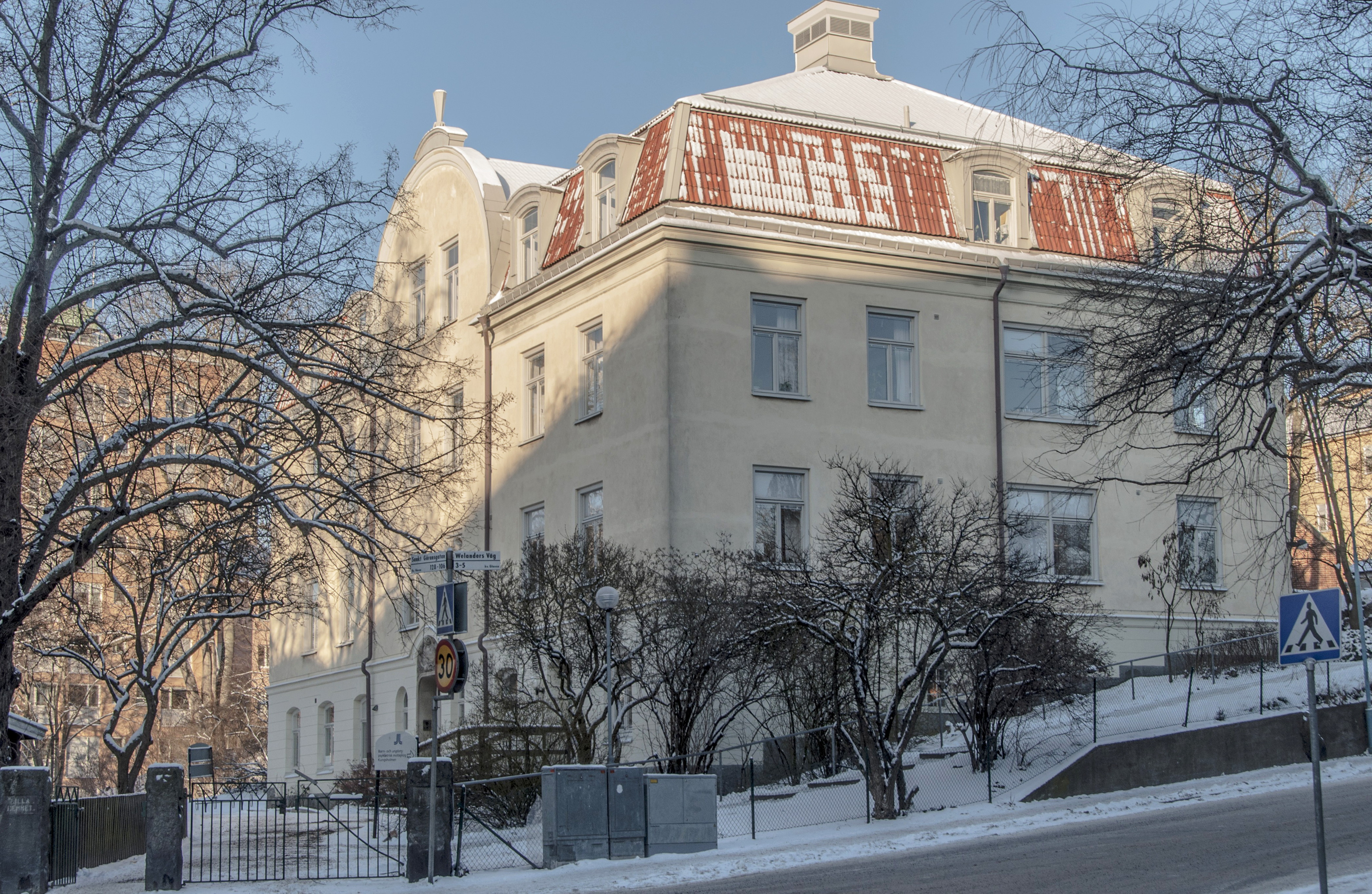 Lilla Hemmet, Kungsholmen, även kallad Welanderhemmet. Sankt Göransgatan 106, Byggnadsår 1908, Blom P. & Co Byggnadsfirma (Byggmästare), Frithiof Svensson (Arkitekt)